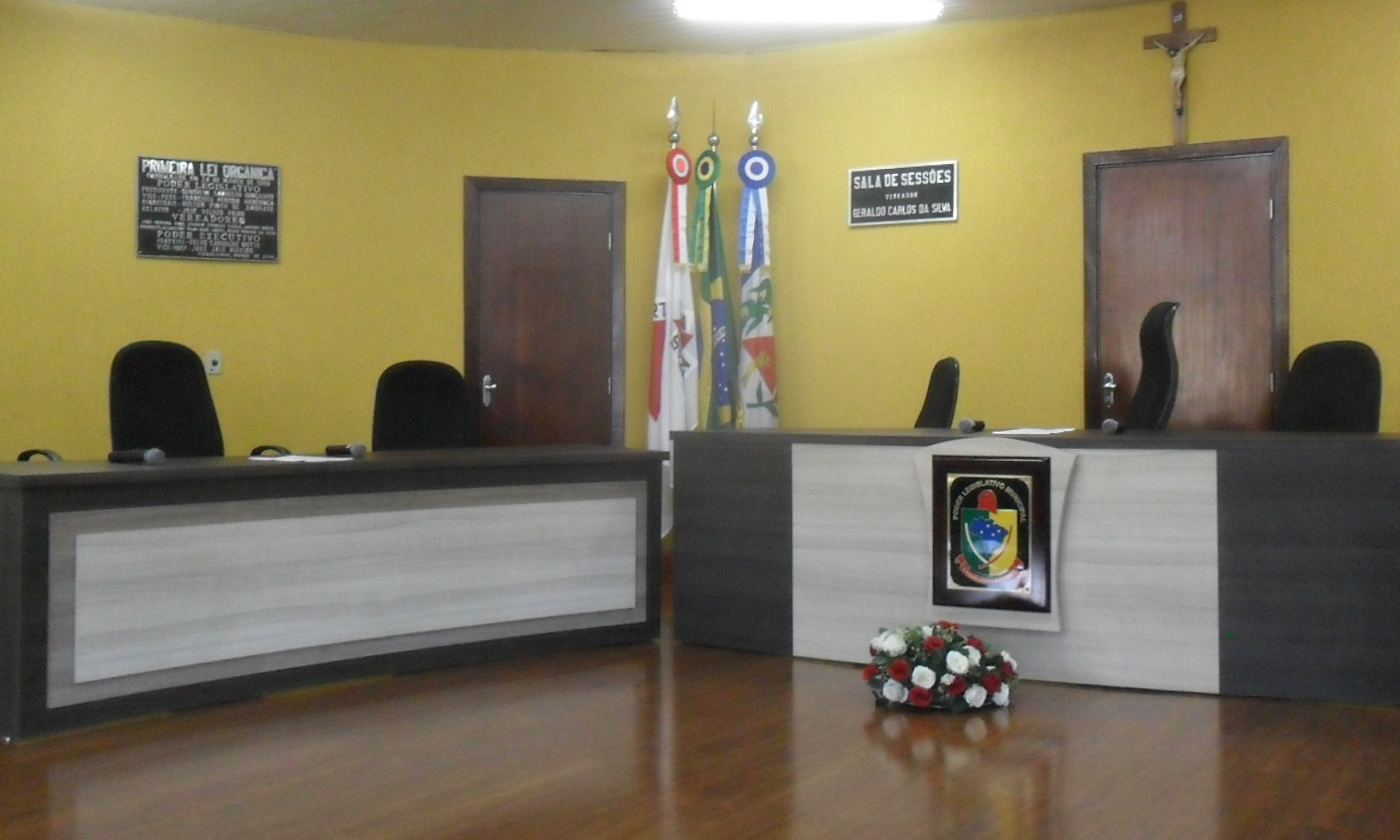 Câmara Municipal de Piranguinho, Minas Gerais, Brasil